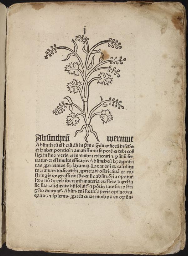 [R]ogatu plurimo[rum] inopu[m] num[m]o[rum] egentiu[m] appotecas refuta[n]tiu[m] occasione illa, q[uia] necessaria ibide[m] ad corp[us] egru[m] specta[n]tia su[n]t cara simplicia et composita ...